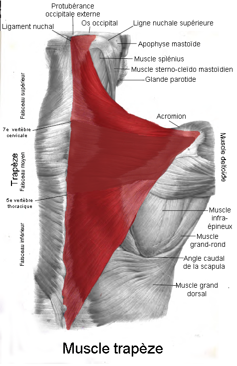 Le muscle trapèze. anatomie humaine